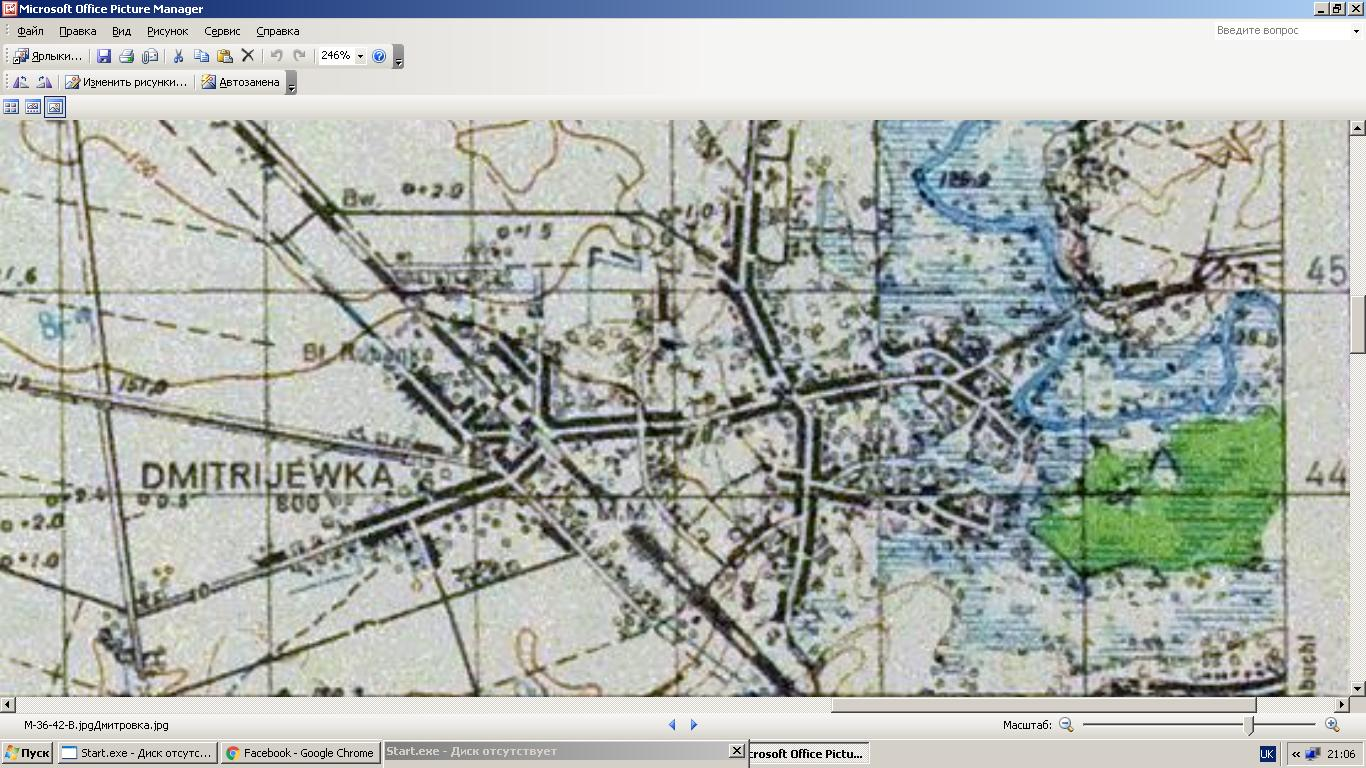 1943, фрагмент карти